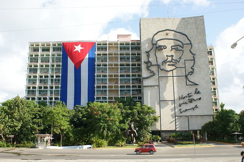 Fachada del Ministerio del Interior de La República de Cuba situado en la plaza de la revolución.